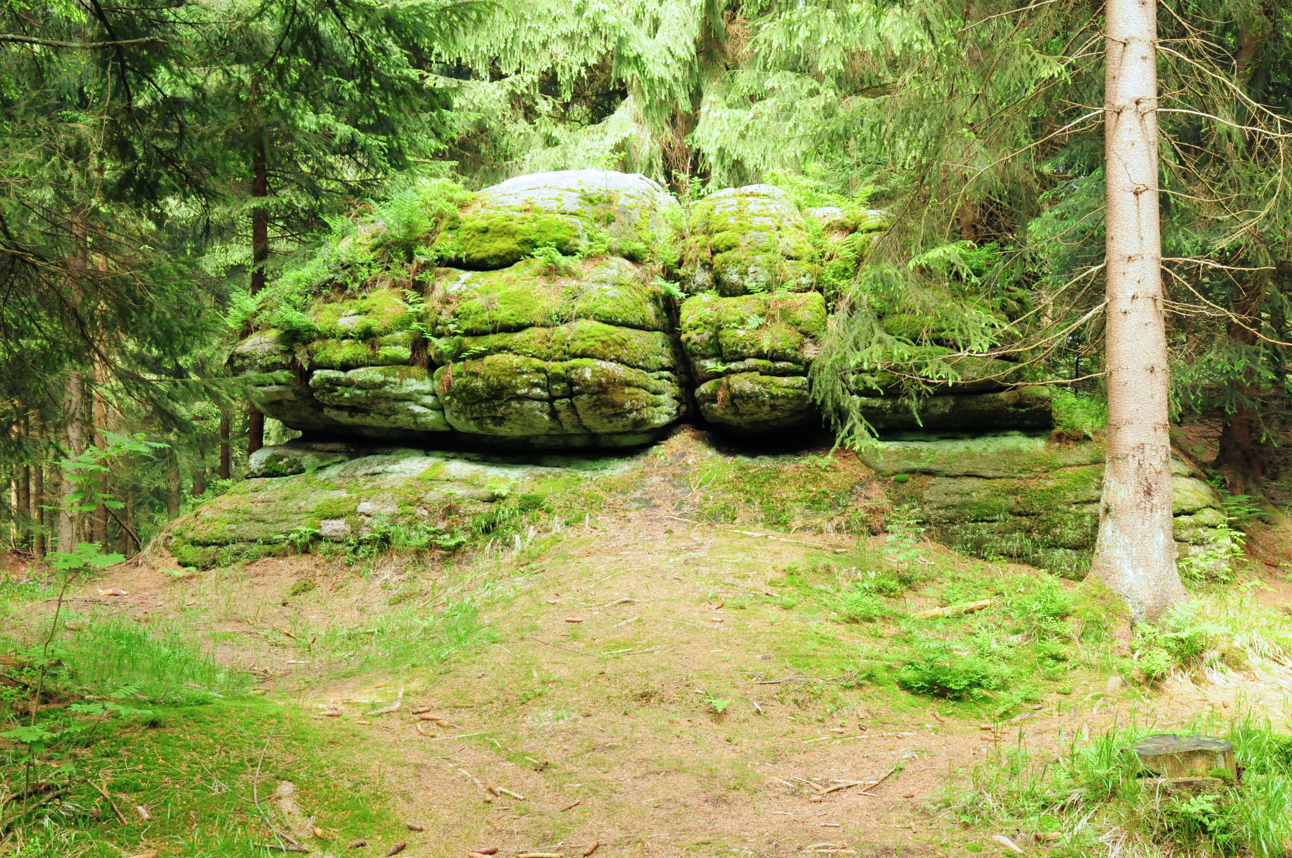 Kamenáč (Aschberg), Felsengruppe nahe der Triangulirungsstation (Bublava, Karlovarský kraj, Tschechische Republik)